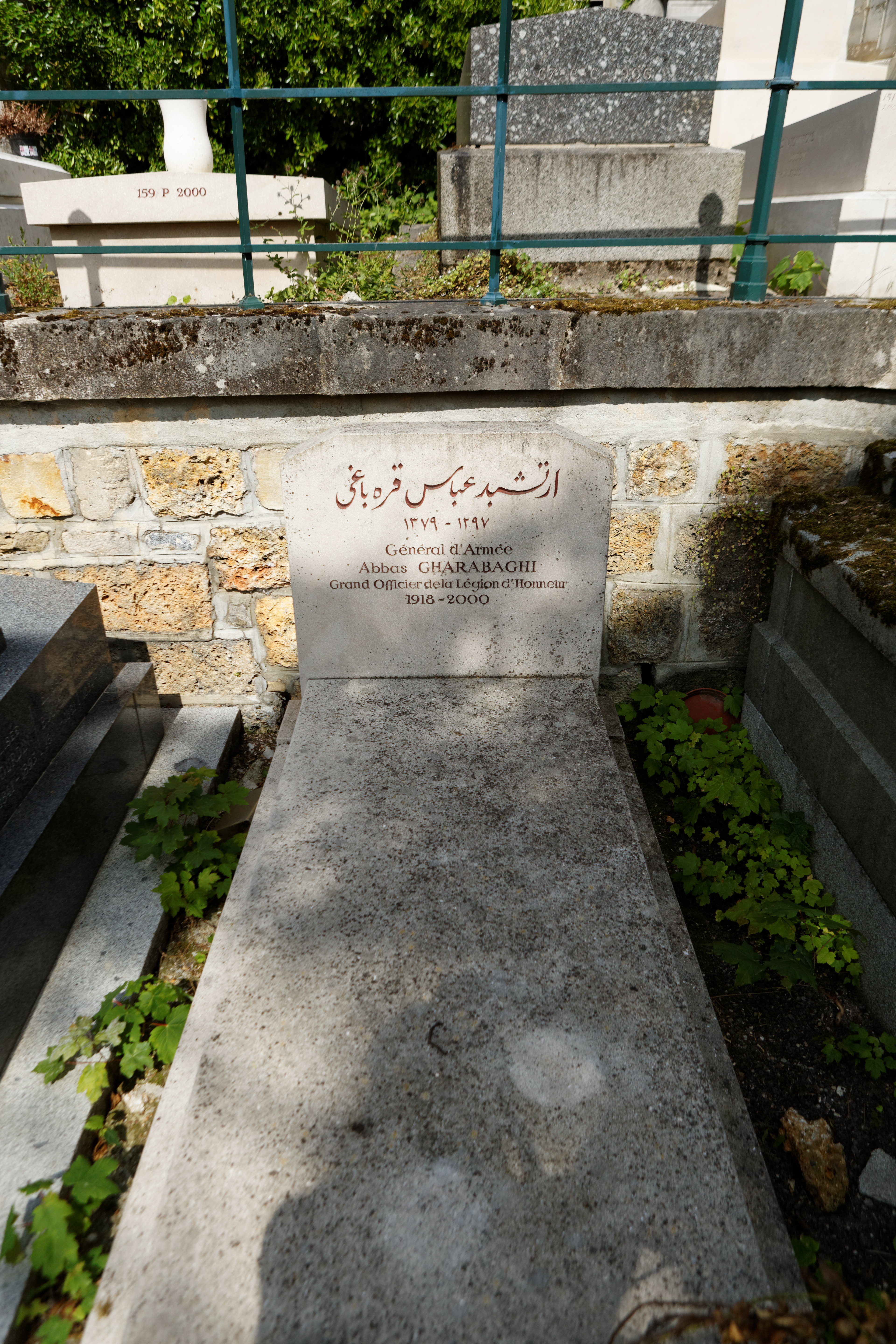 Sépulture d'Abbas Gharabaghi (1918-2000), dernier chef d'État-major interarmes de l'armée impériale d'Iran.